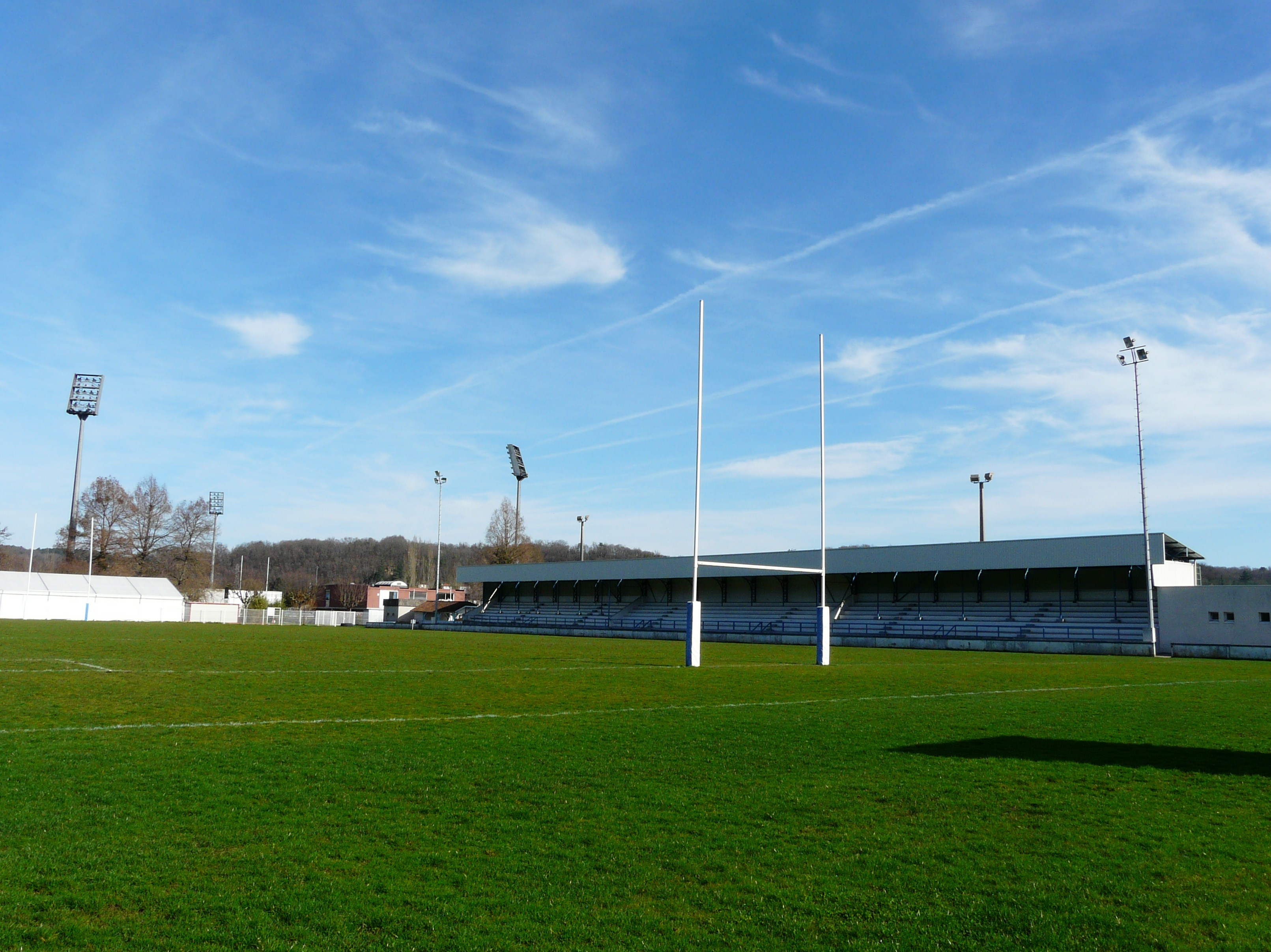 Le stade Roger-Dantou, Périgueux, Dordogne, France.